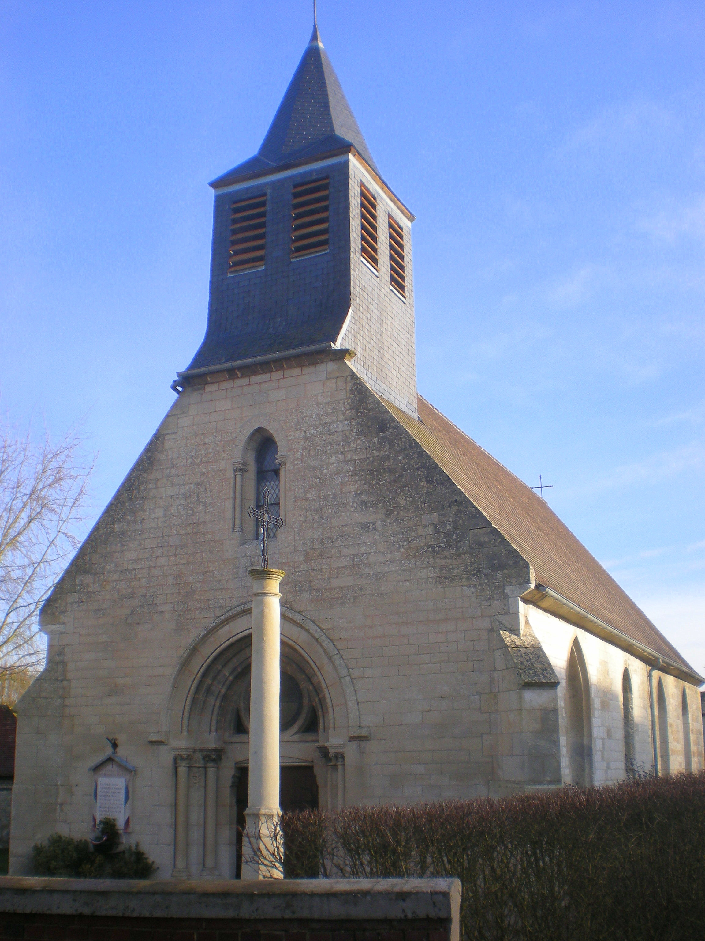 L'église Saint-Aubin de Saint-Aubin-sous-Erquery depuis le sud-ouest.